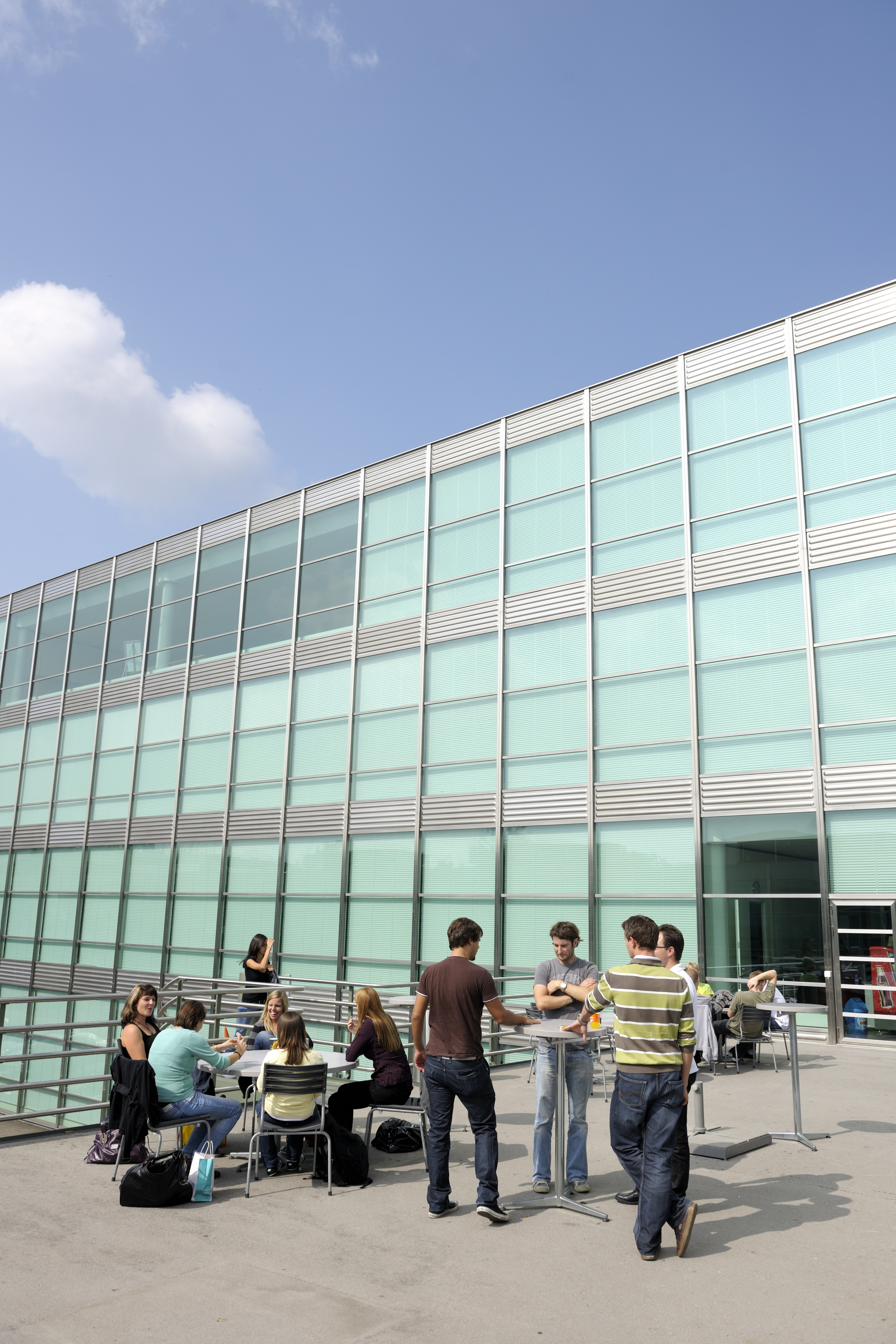 Fachhochschule Nordwestschweiz FHNW Hauptgebäude in Windisch